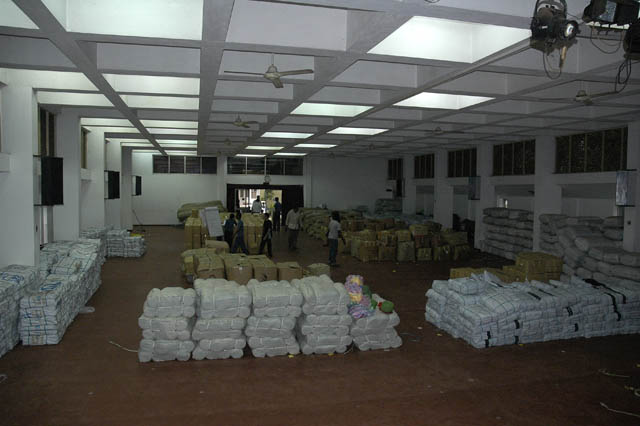 Storage room, Sarvodaya HQ